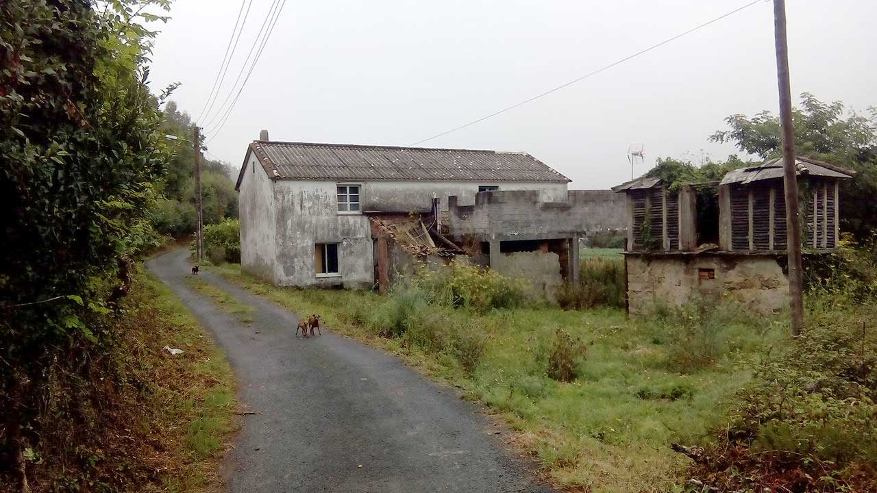 Vista do Codesal, O Val.